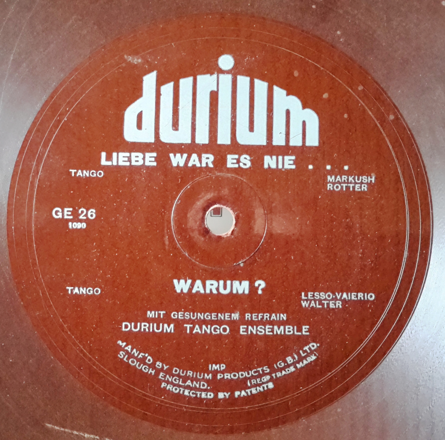 Label der Marke Durium, Platte aus Pappe mit Kunststoff-Auflage, englisches Produkt mit deutschen Tango-Schlagern